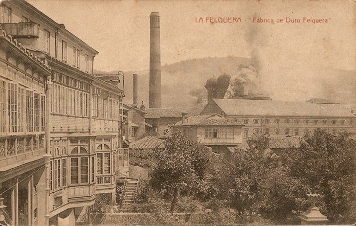 Postal de la fábrica de La Felguera en los años 10 o 20 del siglo XX